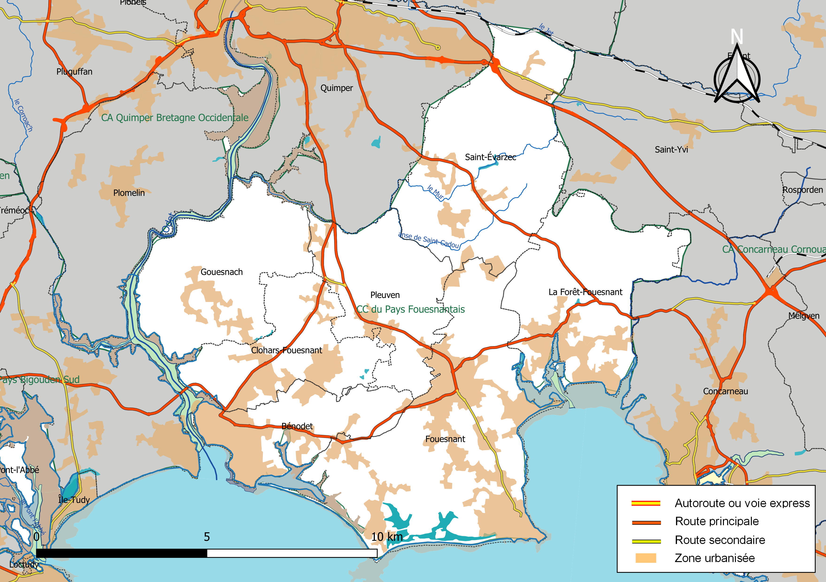 Carte géographique de la Communauté de communes du Pays Fouesnantais, département du Finistère, France. Composition au 1er janvier 2019.